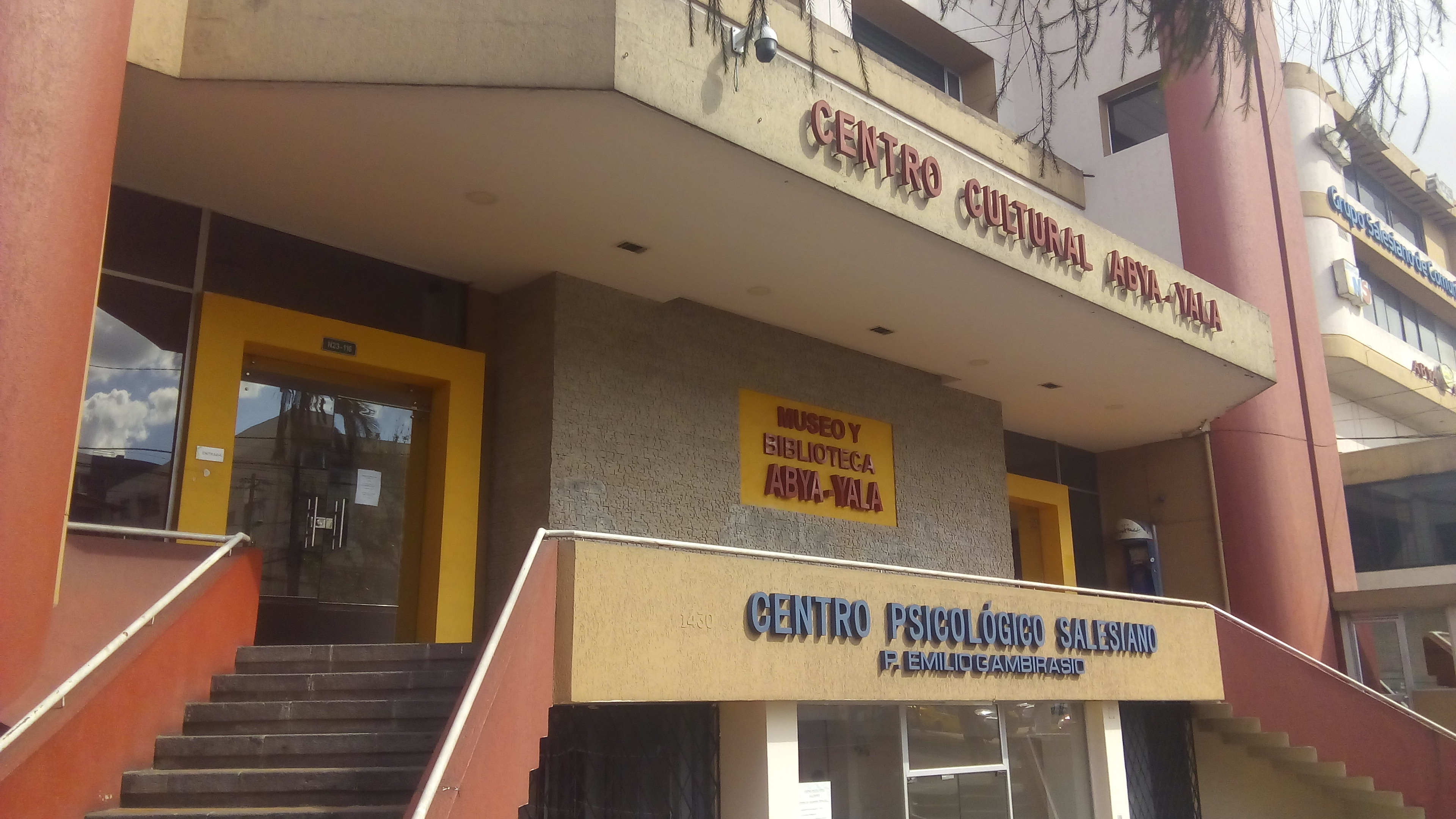 Eldonejo kaj muzeo Abya Yala